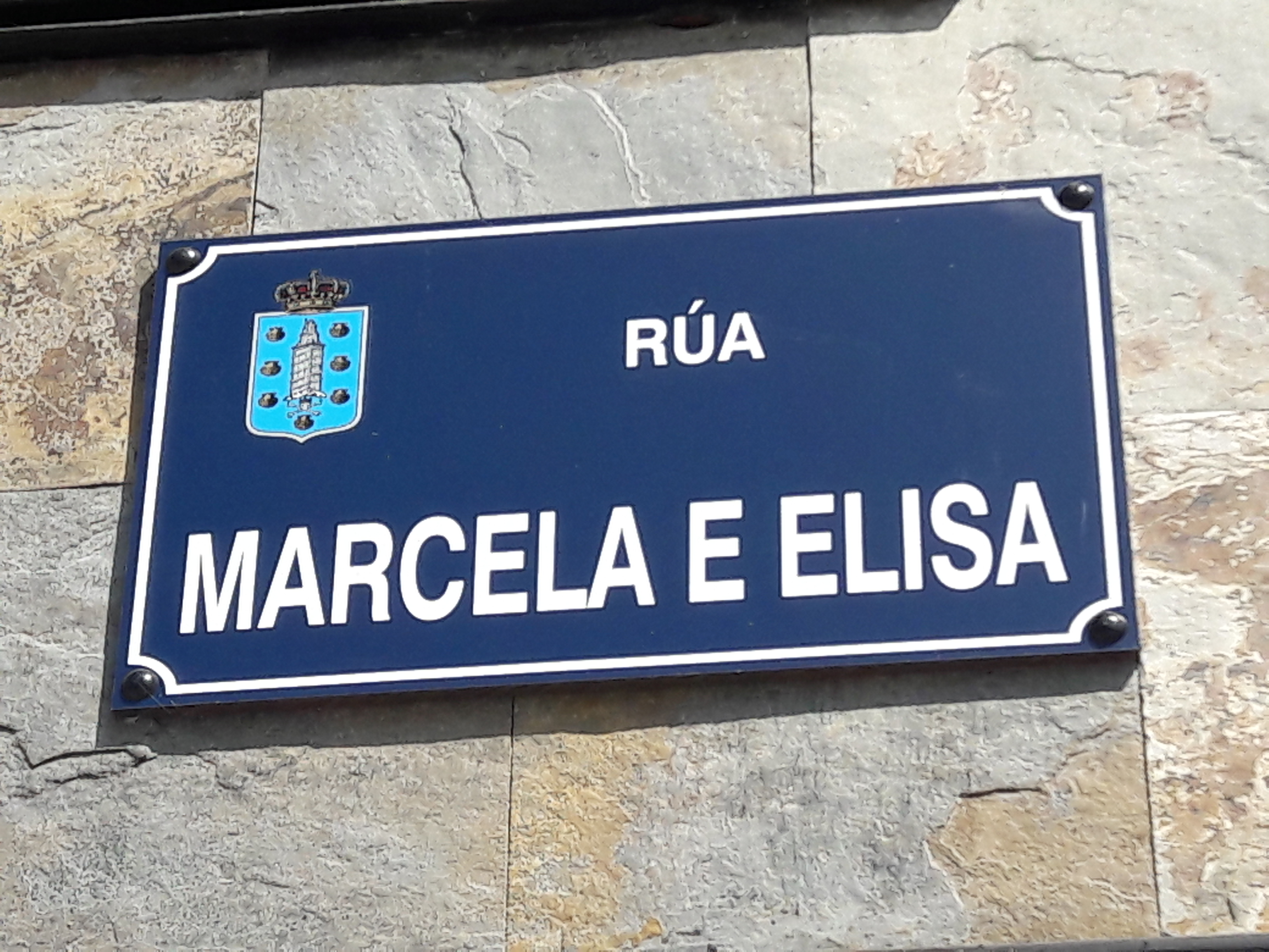 Rótulo da rúa Marcela e Elisa na Coruña, pioneiras do matrimonio entre persoas do mesmo sexo.